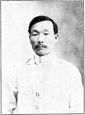 丁象謙，民國政治人物、第一屆國會眾議院議員。